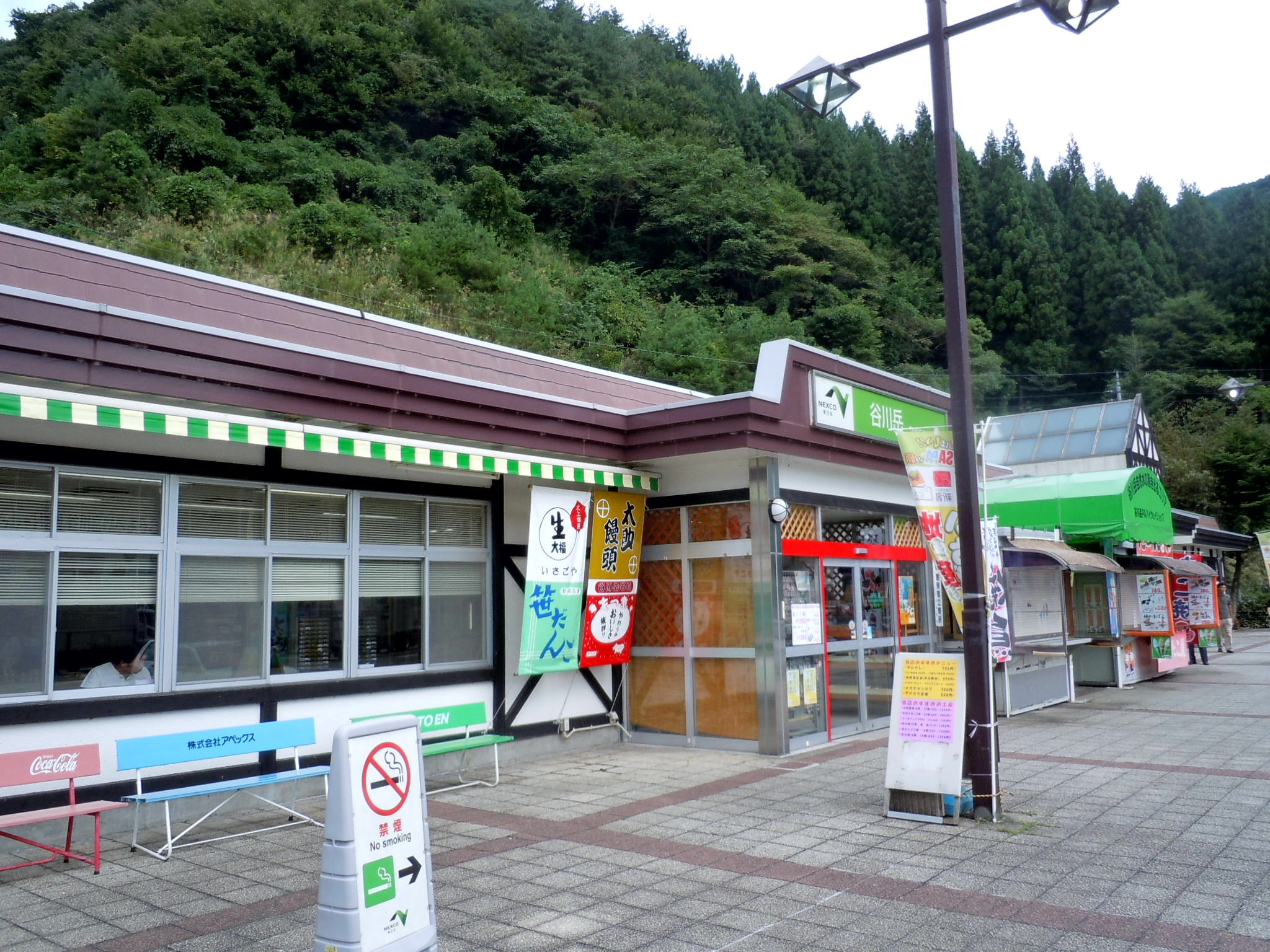 関越自動車道 谷川岳パーキングエリア